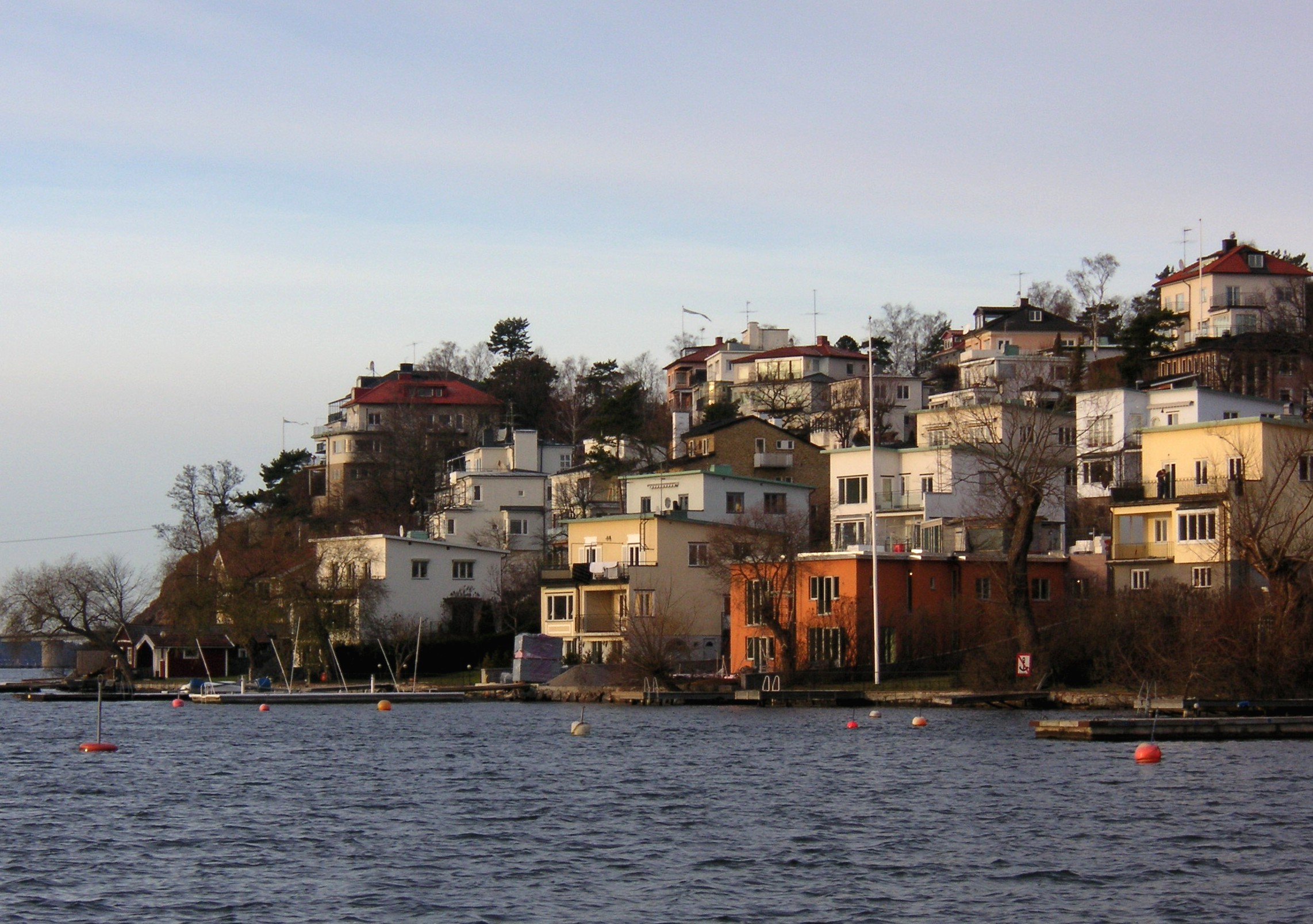 Höglandet i Västerort från Mälaren